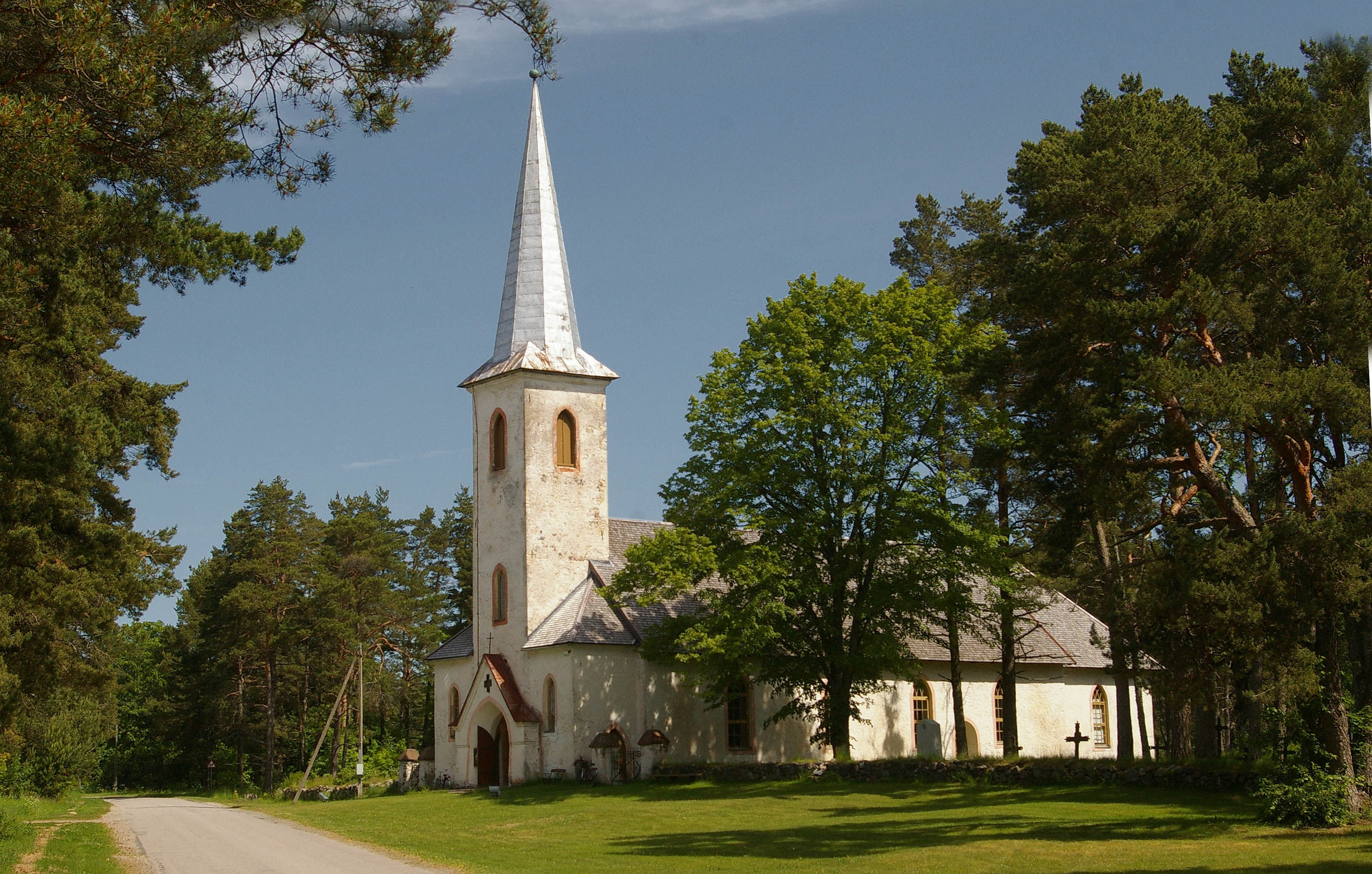 Varbla kirik